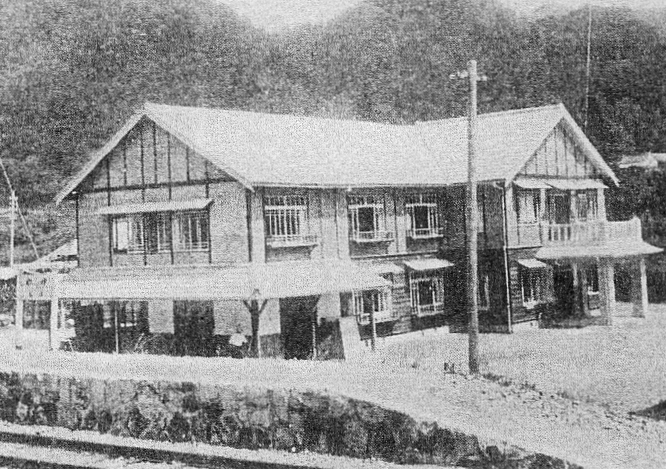 温泉の入口湯谷駅（昭和初年）